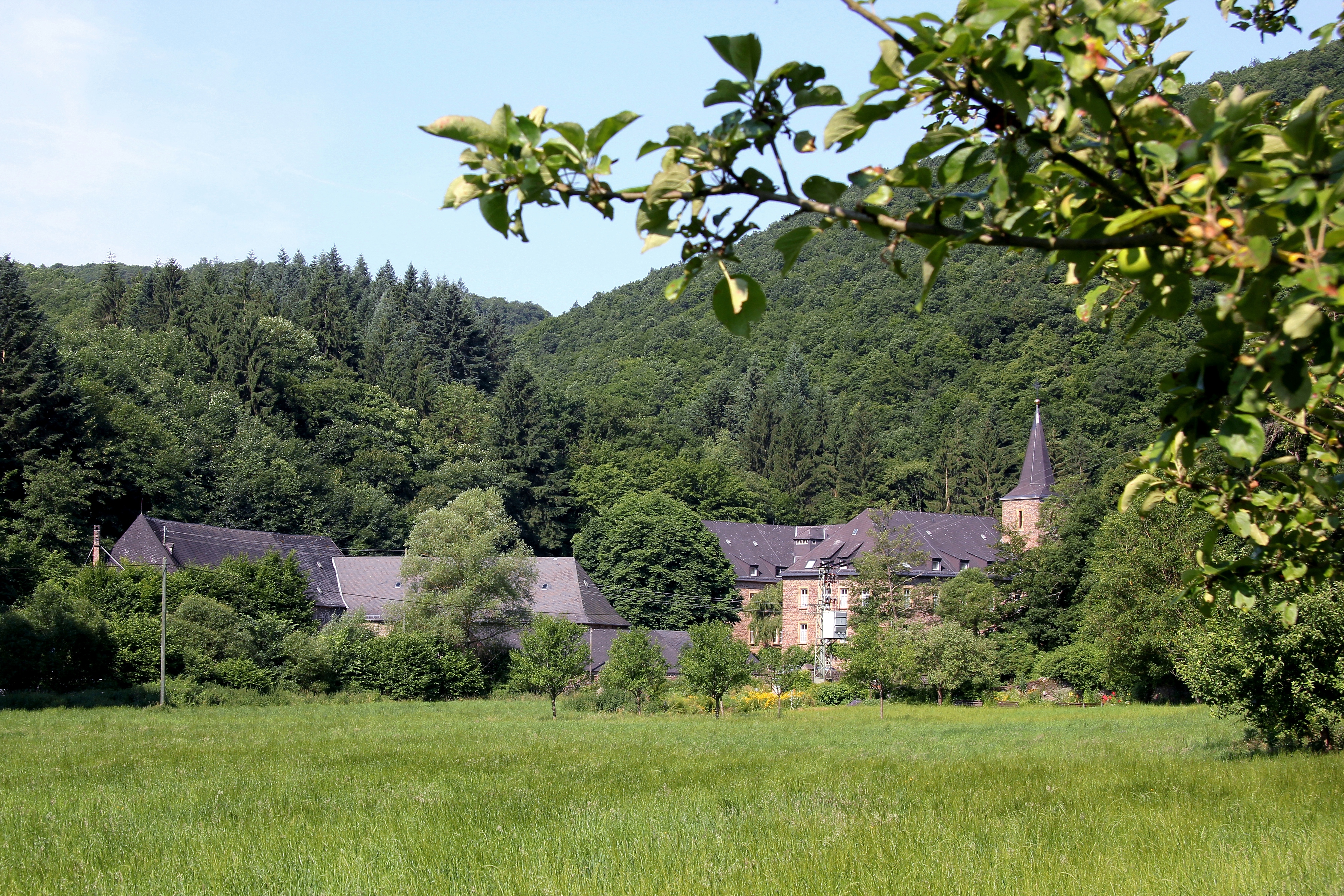 Kloster Maria Engelport im Flaumbachtal bei Treis-Karden – links die Nebengebäude